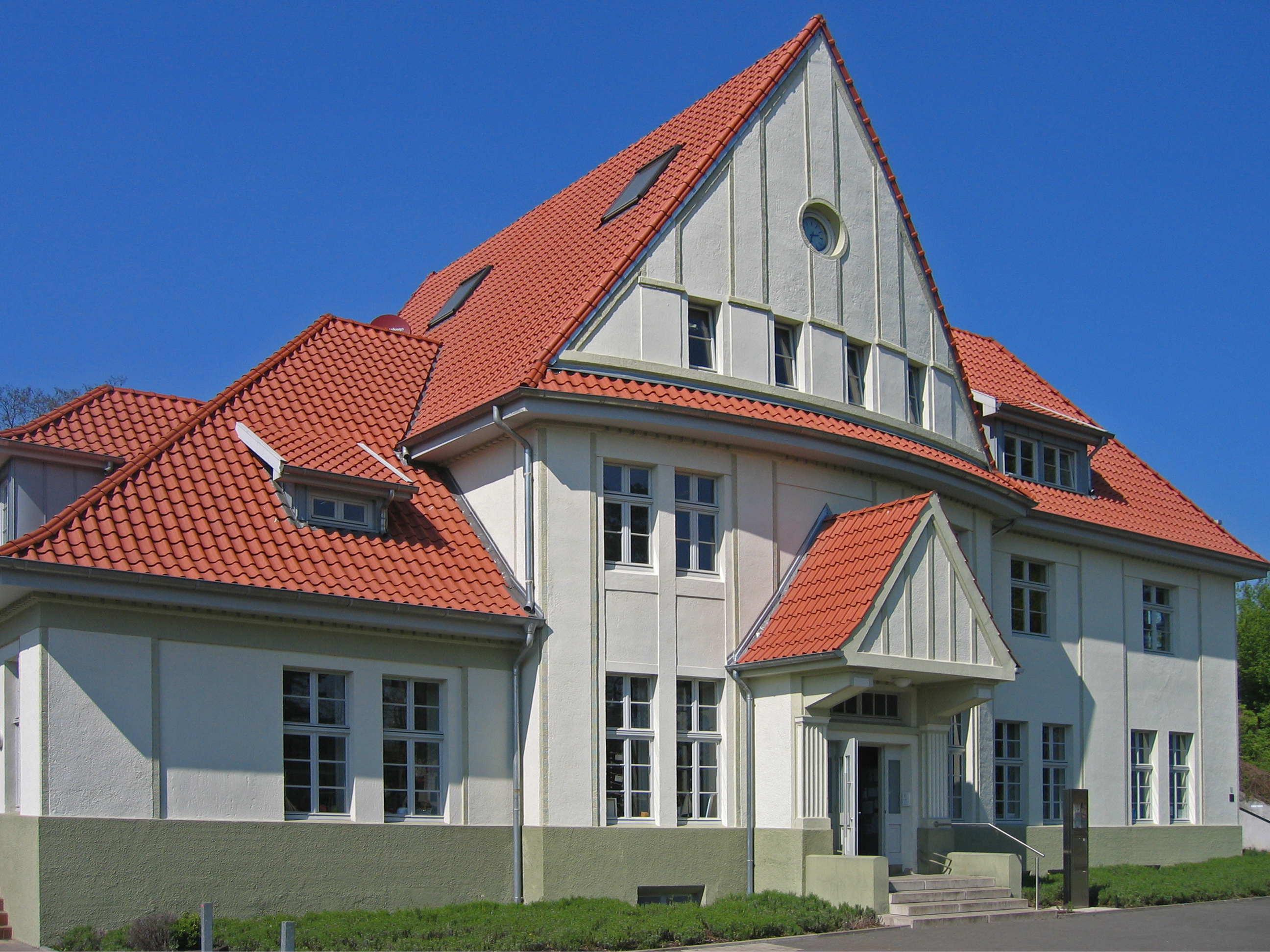 Bahnhof Isselhorst-Avenwedde in Gütersloh This is a photograph of an architectural monument. 128